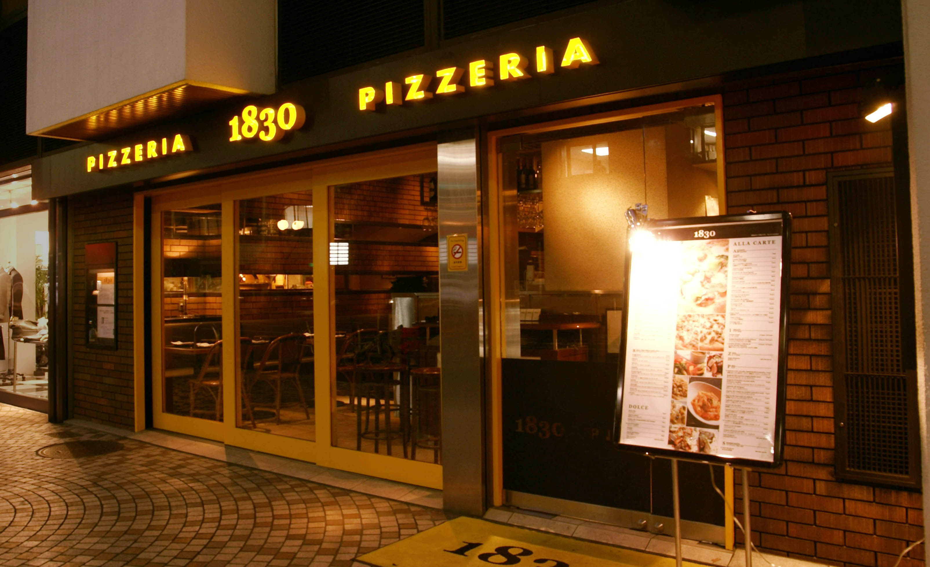 PIZZERIA 1830 乃木坂